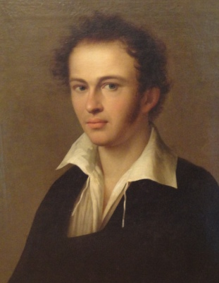 Portret NN